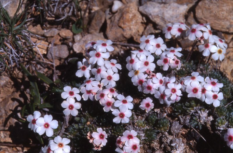 Androsace villosa, Formigal (Aragon)